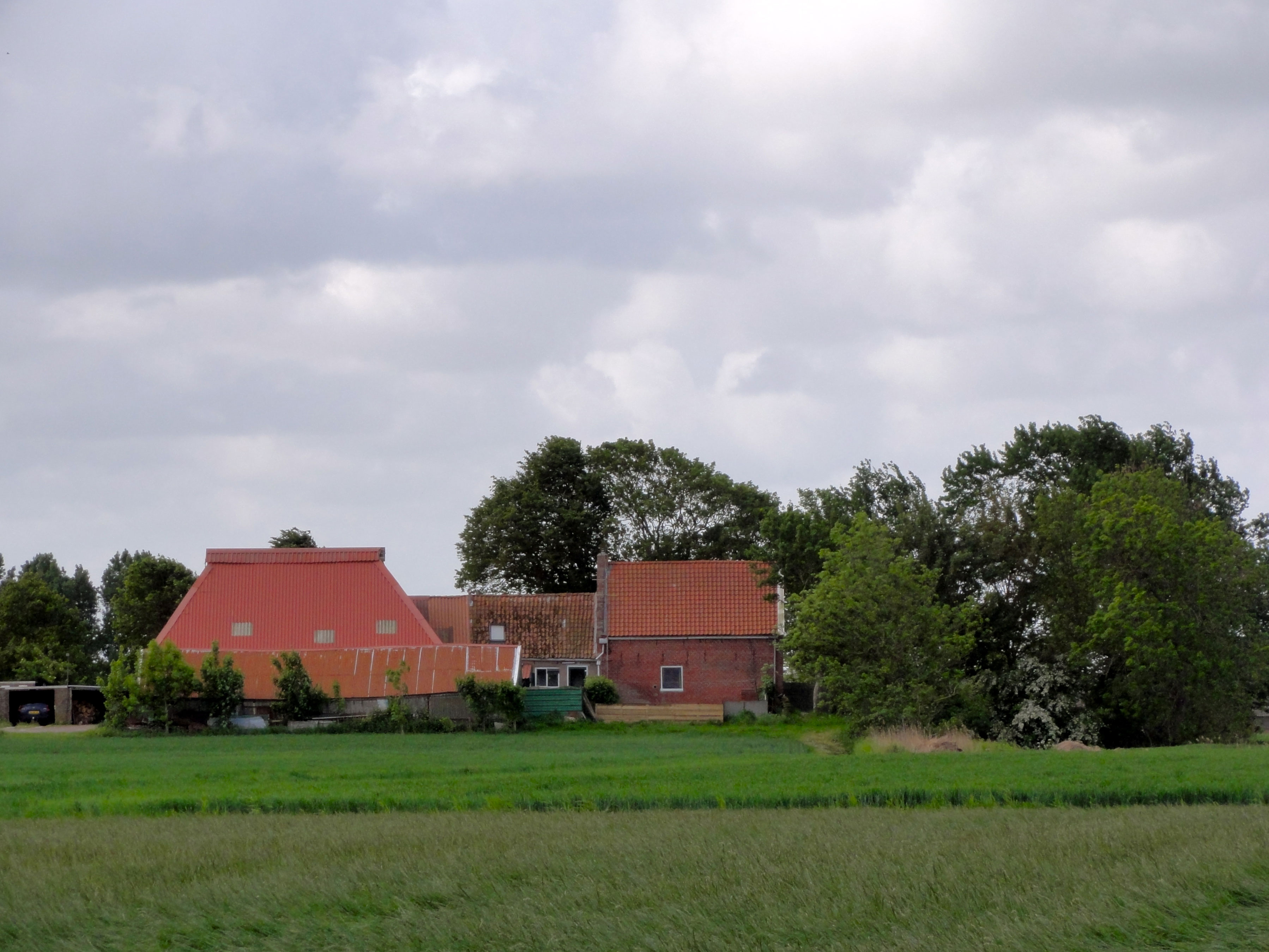 Huisterp bij Kienstraloane nabij Blija